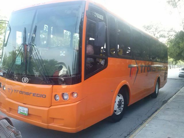 Ruta 2 de Monterrey